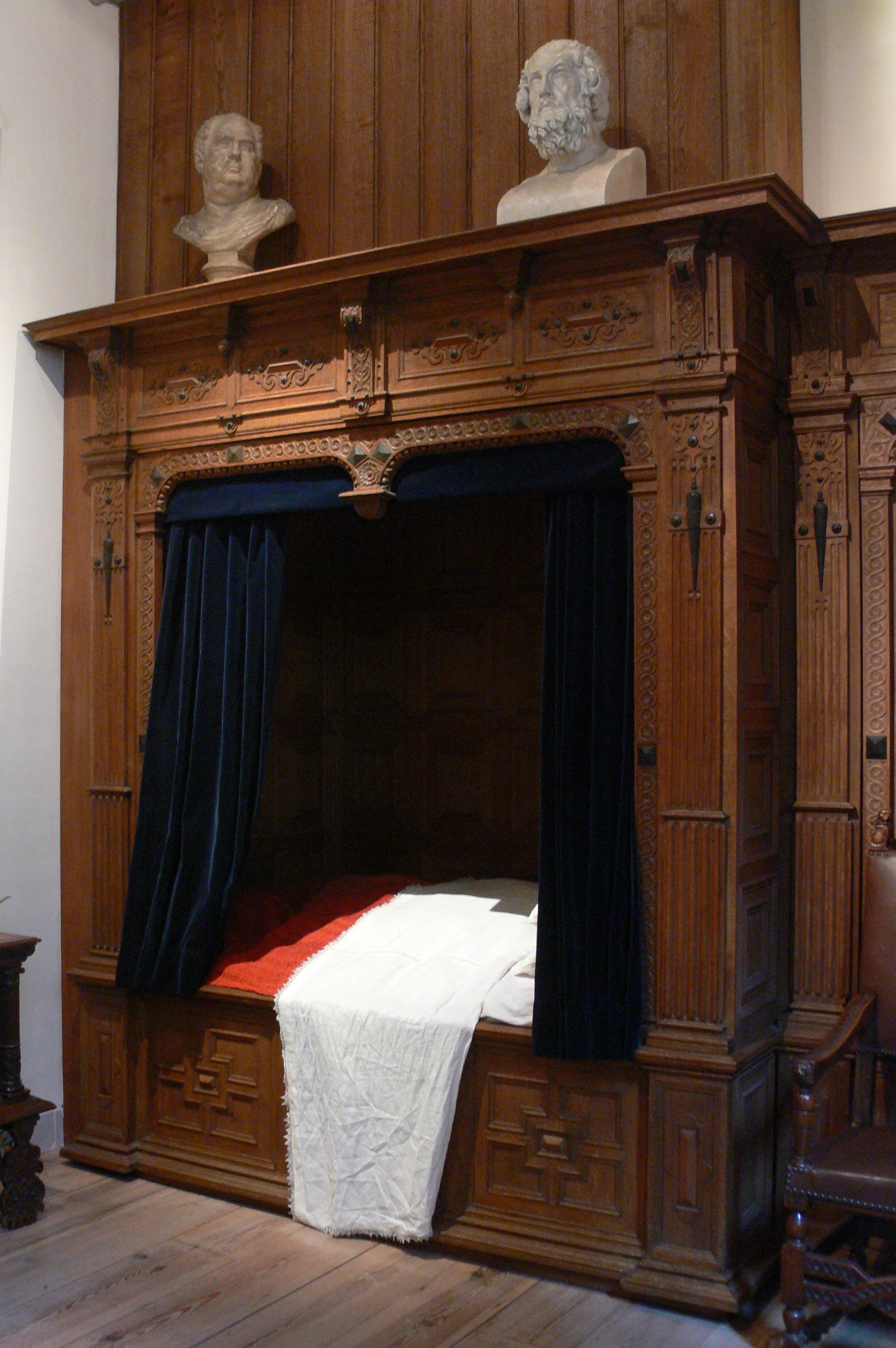 Amsterdam - Rembrandthuis - Saskia's bed